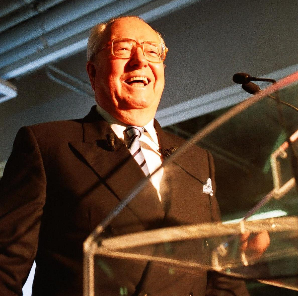 Jean-Marie Le Pen au meeting du Front National à Paris.